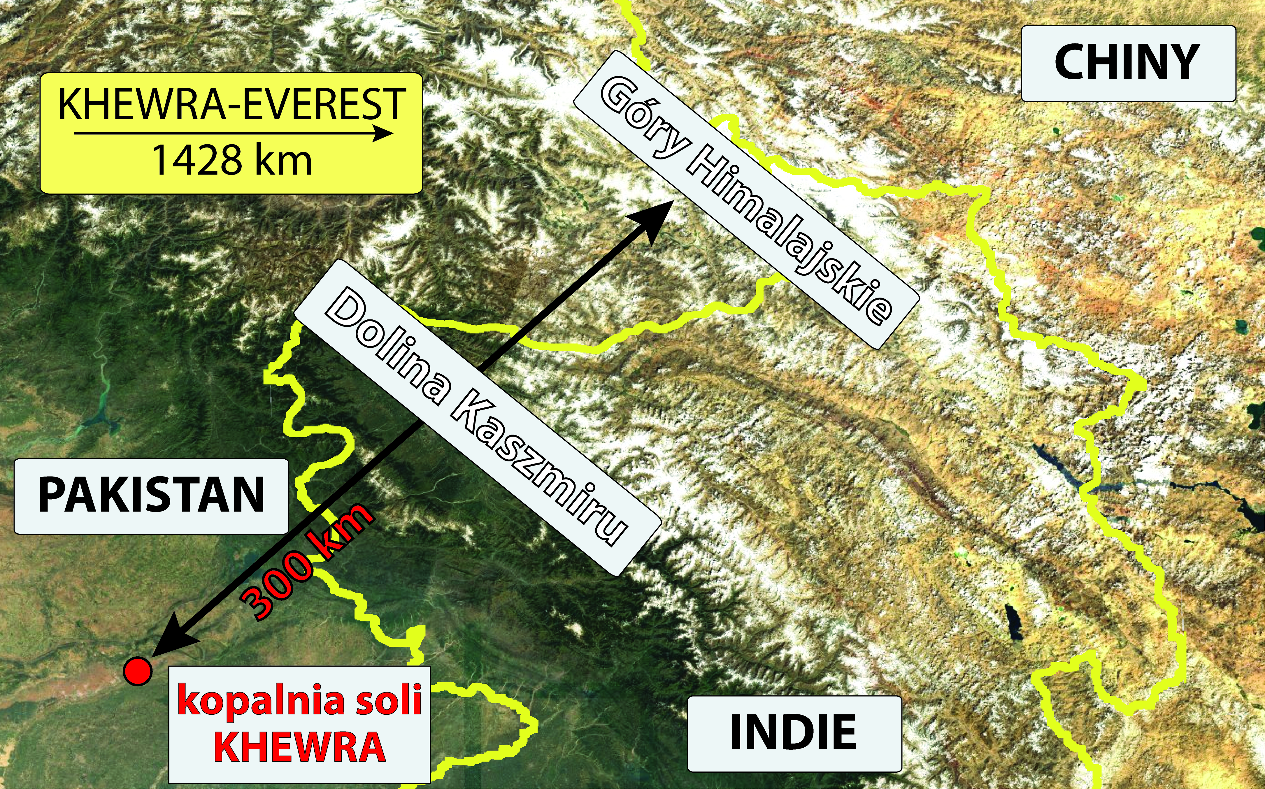 Położenie geograficzne kopalni soli Khewra w odniesieniu do Himalajów.